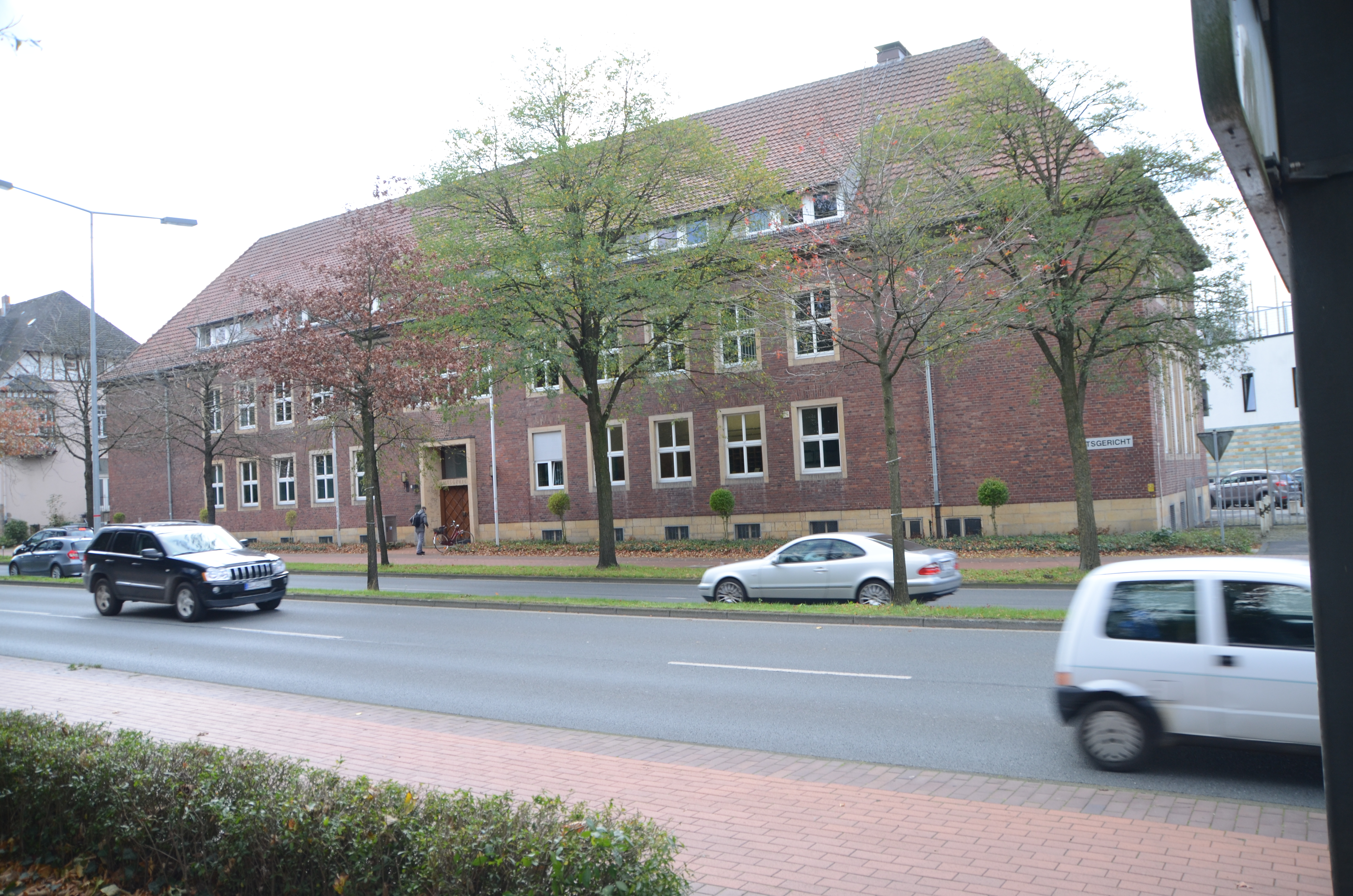 Amtsgericht Rheine an der Salzbergener Straße